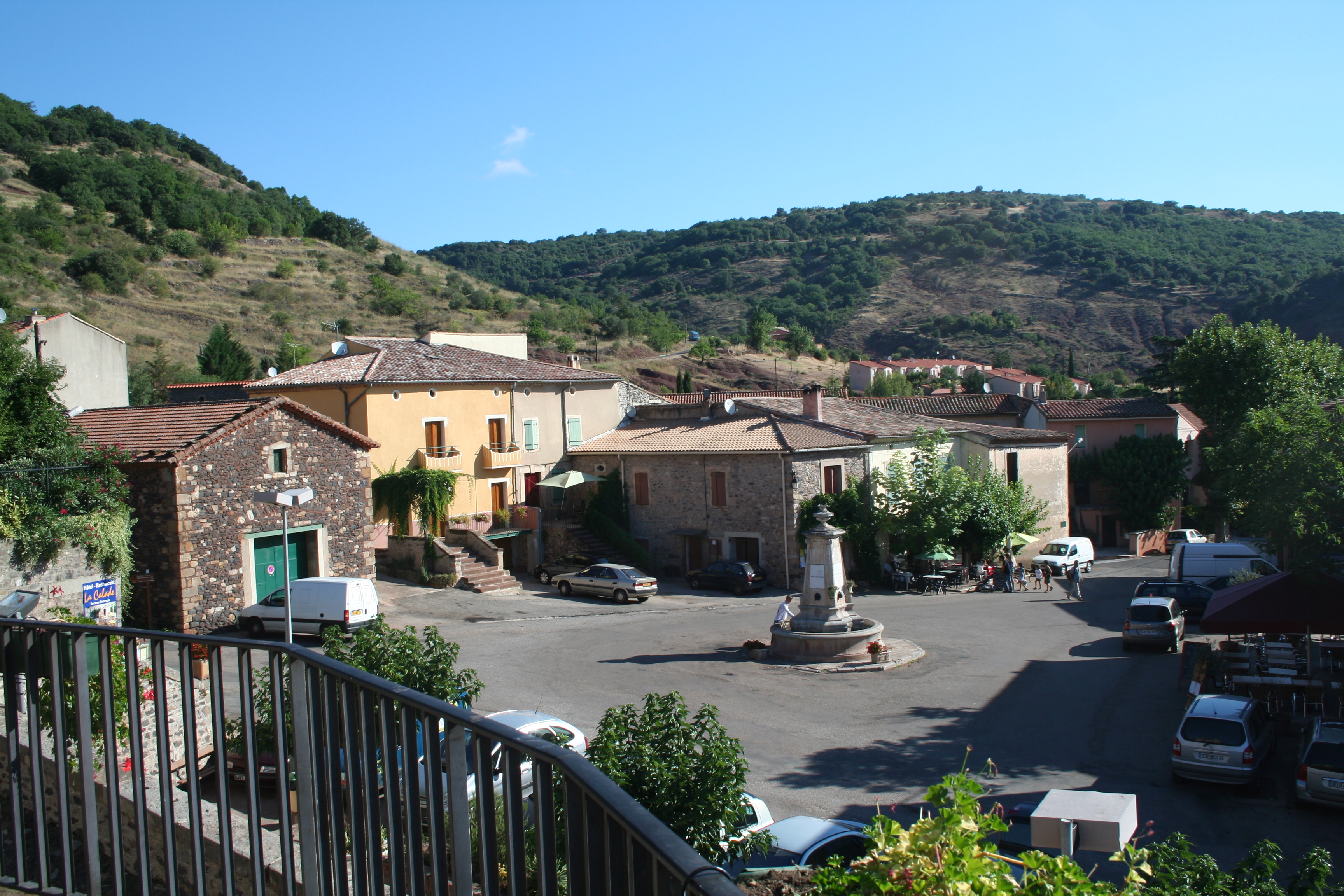 Octon (Hérault) - la place avec sa fontaine au milieu.